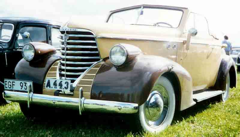 Oldsmobile Series F-383667 Convertible Coupé 1938